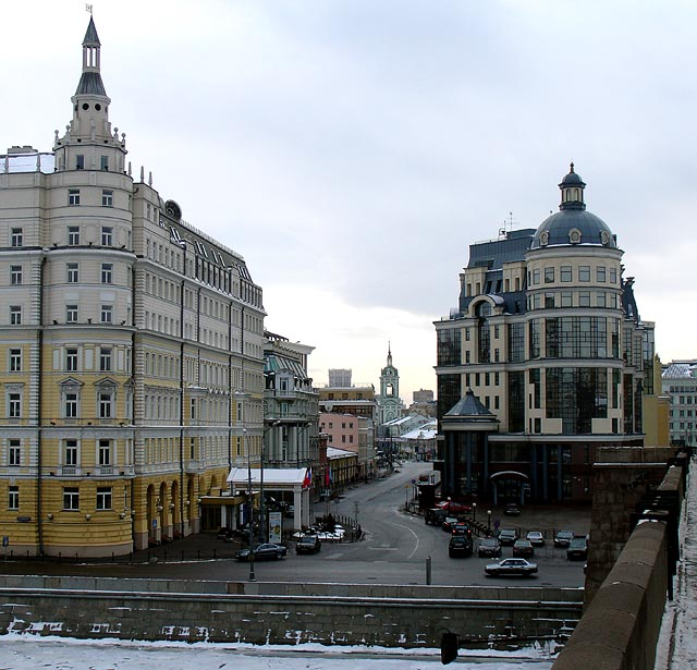 Balchug Street, Balchug Hotel (left), Moscow, Russia